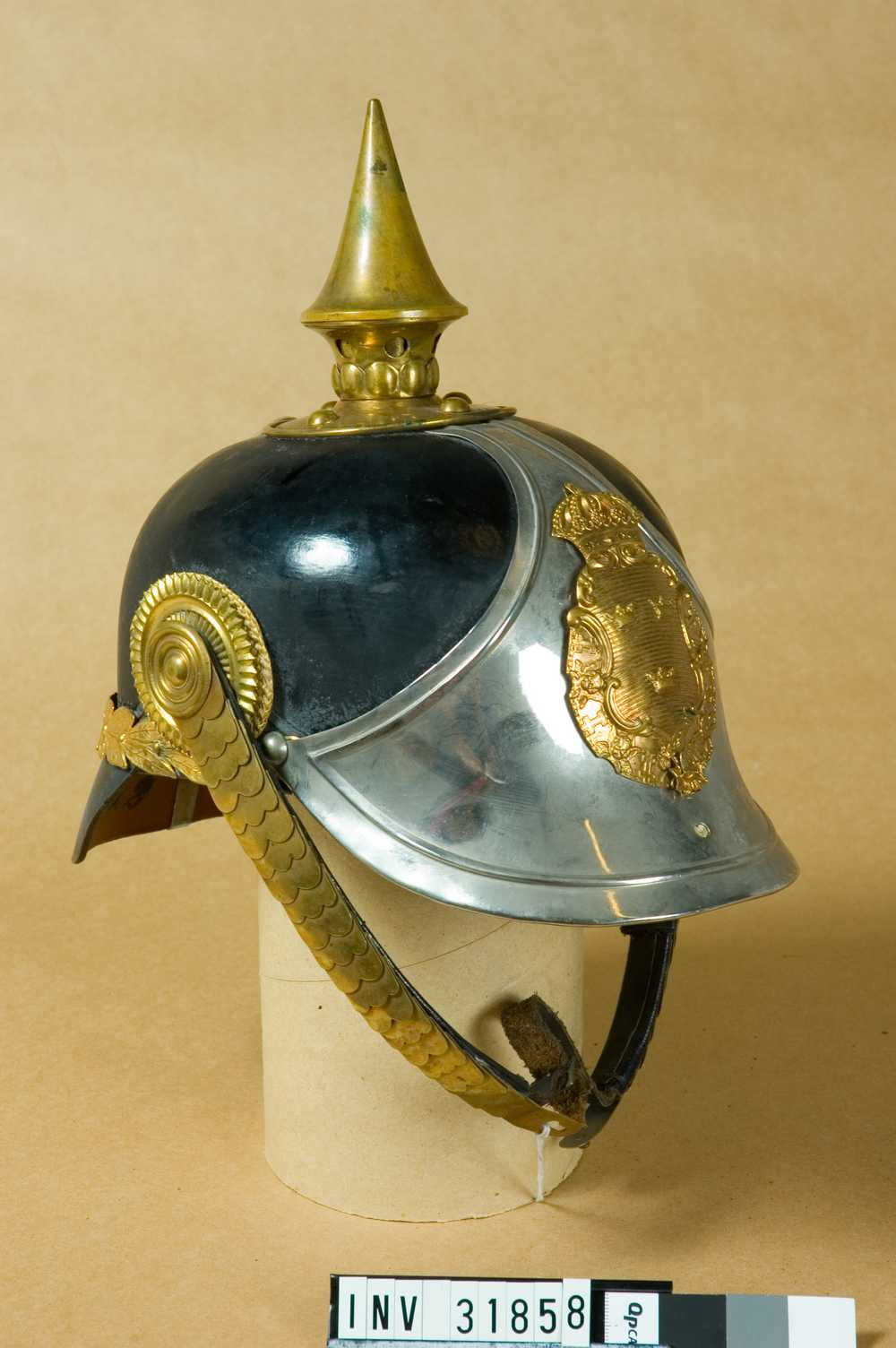 Hjälm m/1895 för manskap vid Livregementets dragoner (K 2). Armémuseums identifikationsnr: AM.031858